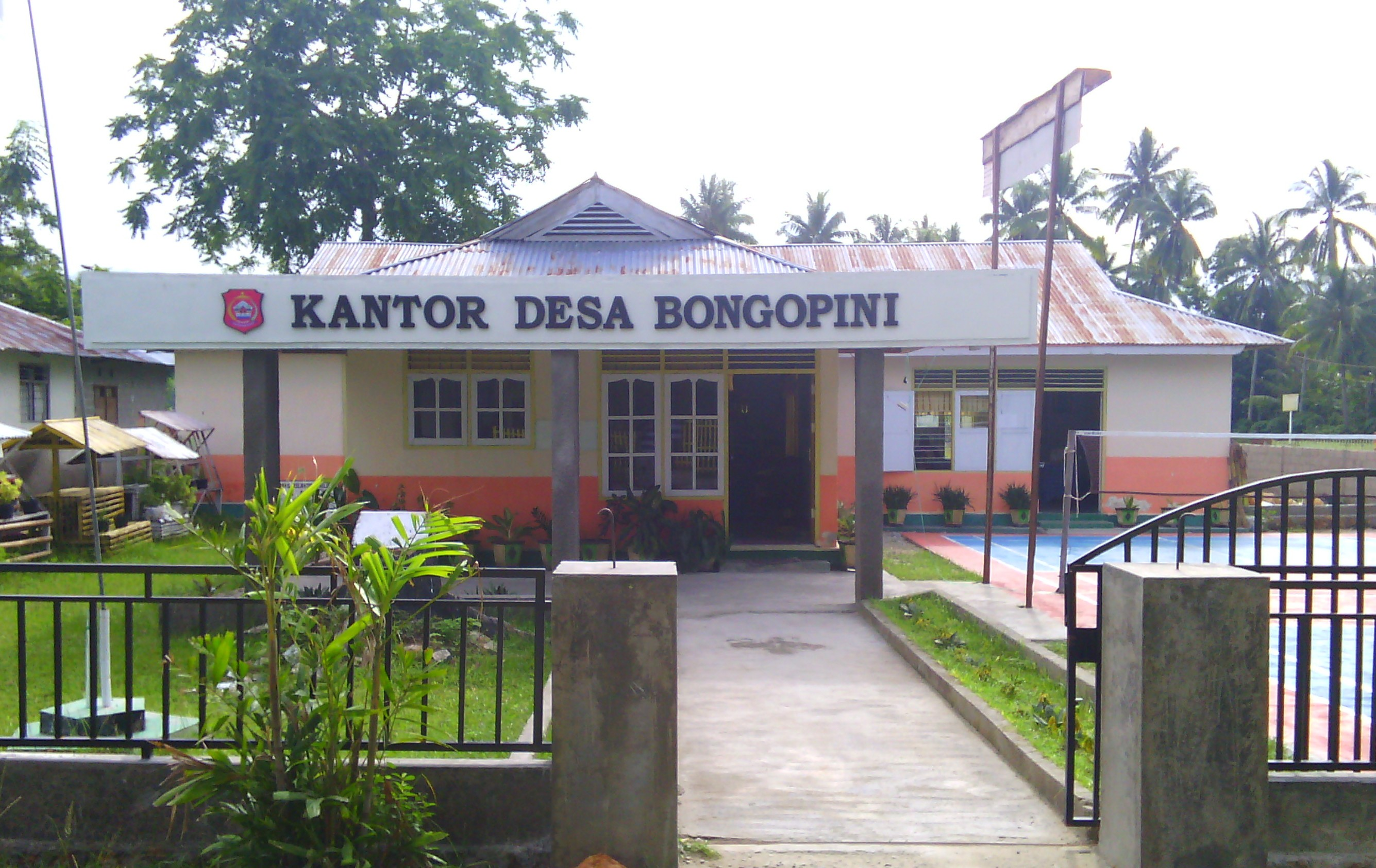 Kantor desa Bongopini, Kecamatan Tilongkabila, Kabupaten Bone Bolango, Provinsi Gorontalo, Indonesia